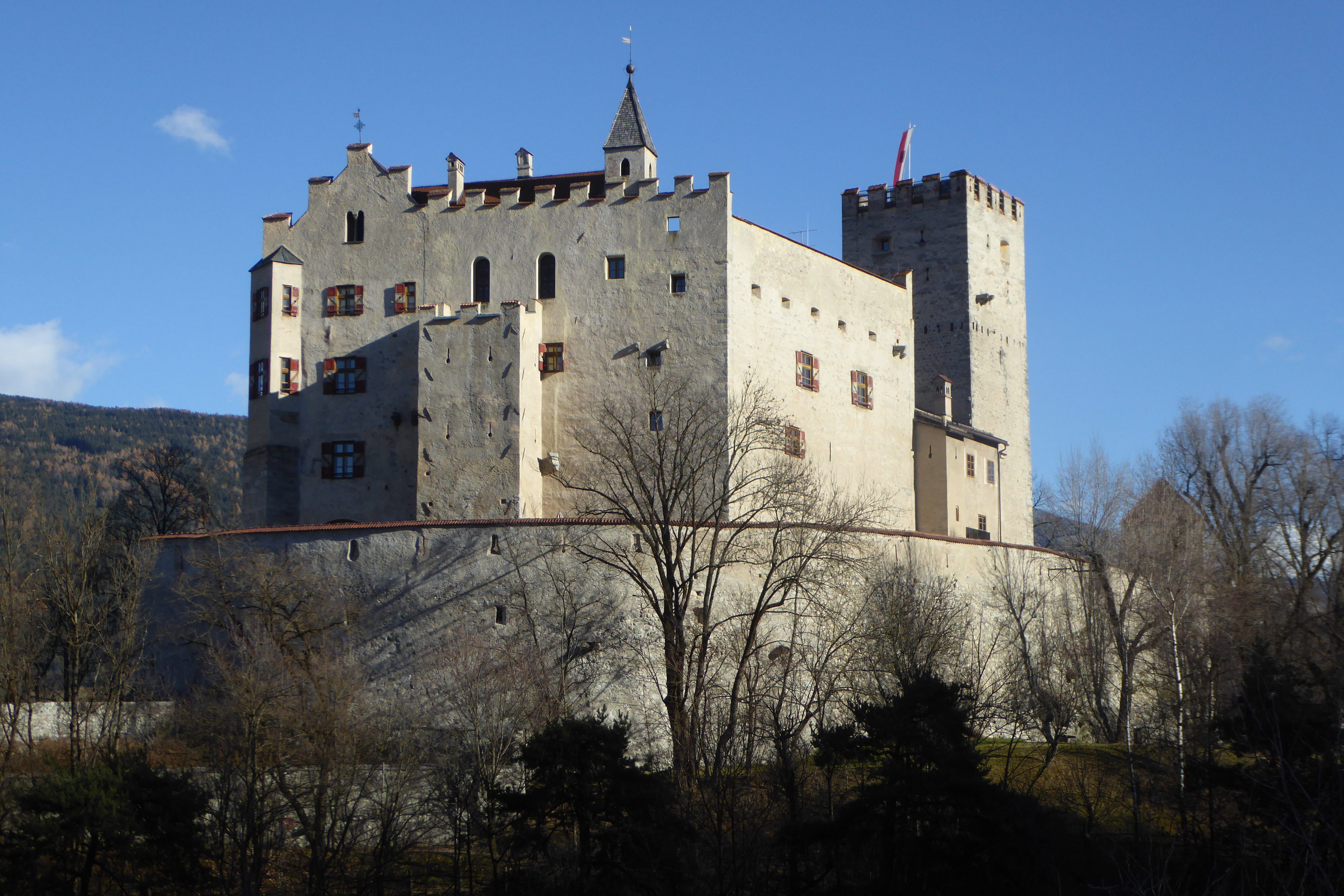 Bruneck (Südtirol), Schloss von Westen gesehen.